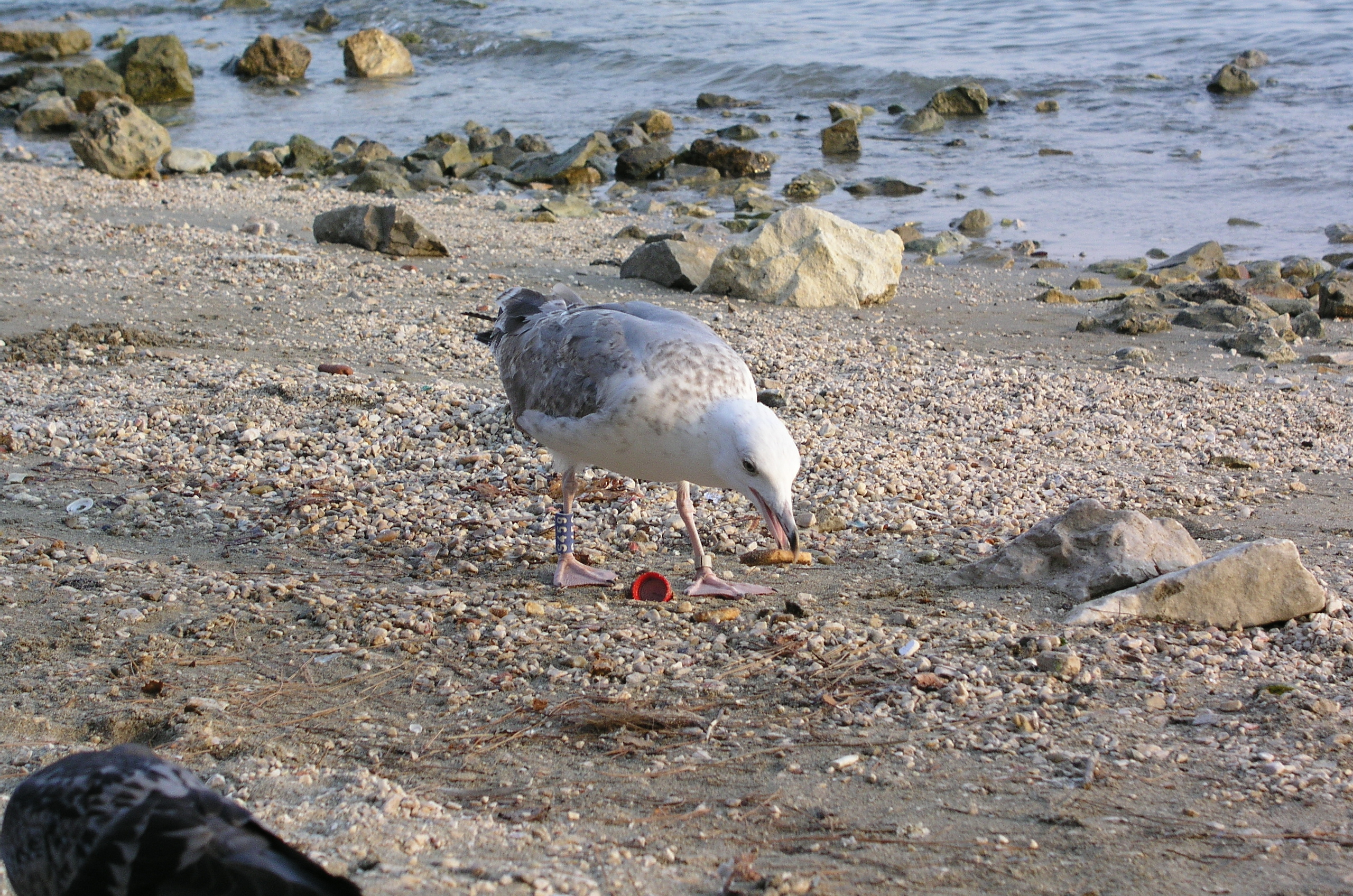 Srebrnasti galeb ili klaukavac (mladi) Larus michahellis